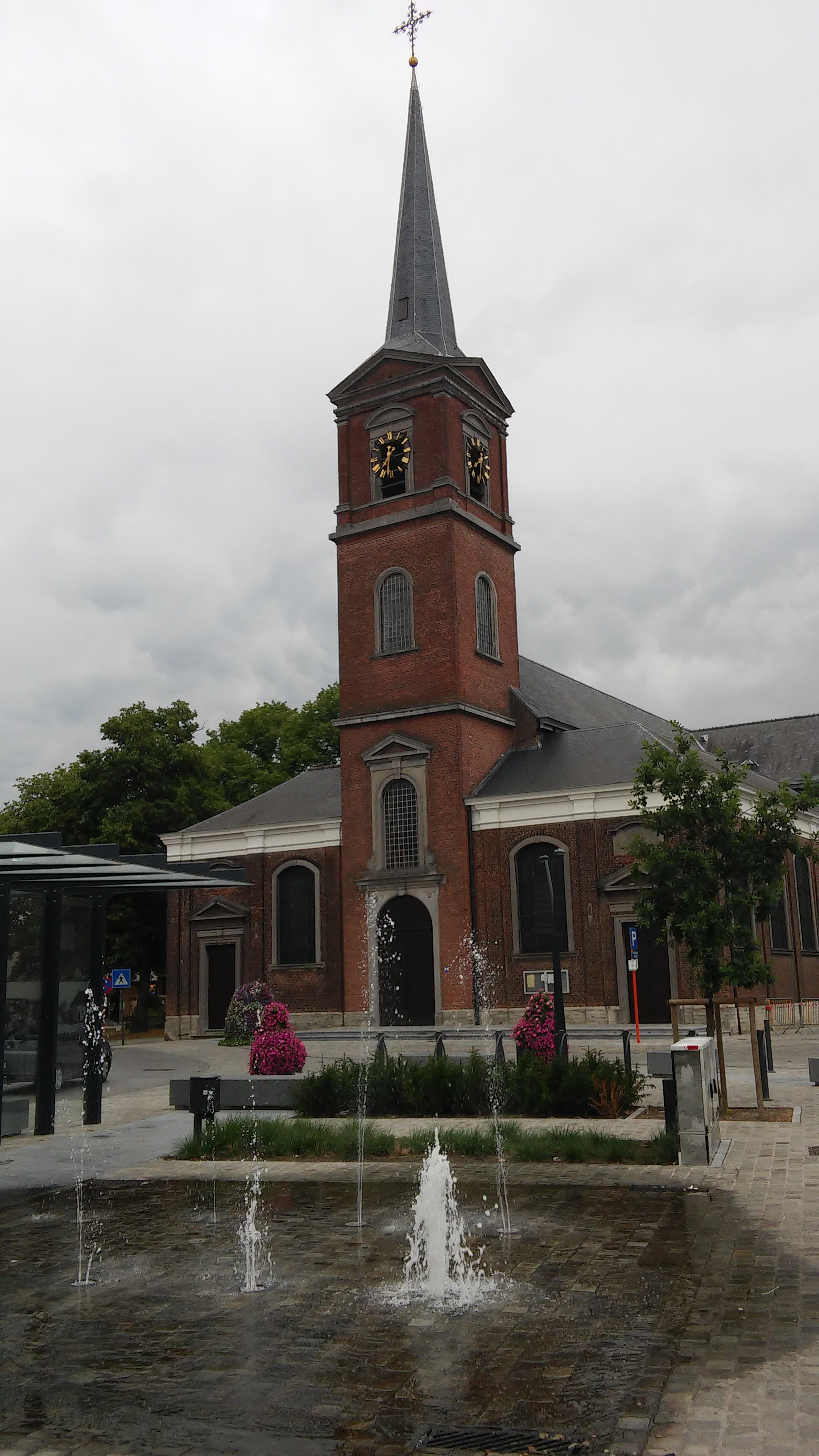 Onze-Lieve-Vrouwkerk, Niel, vanaf Dorpstraat